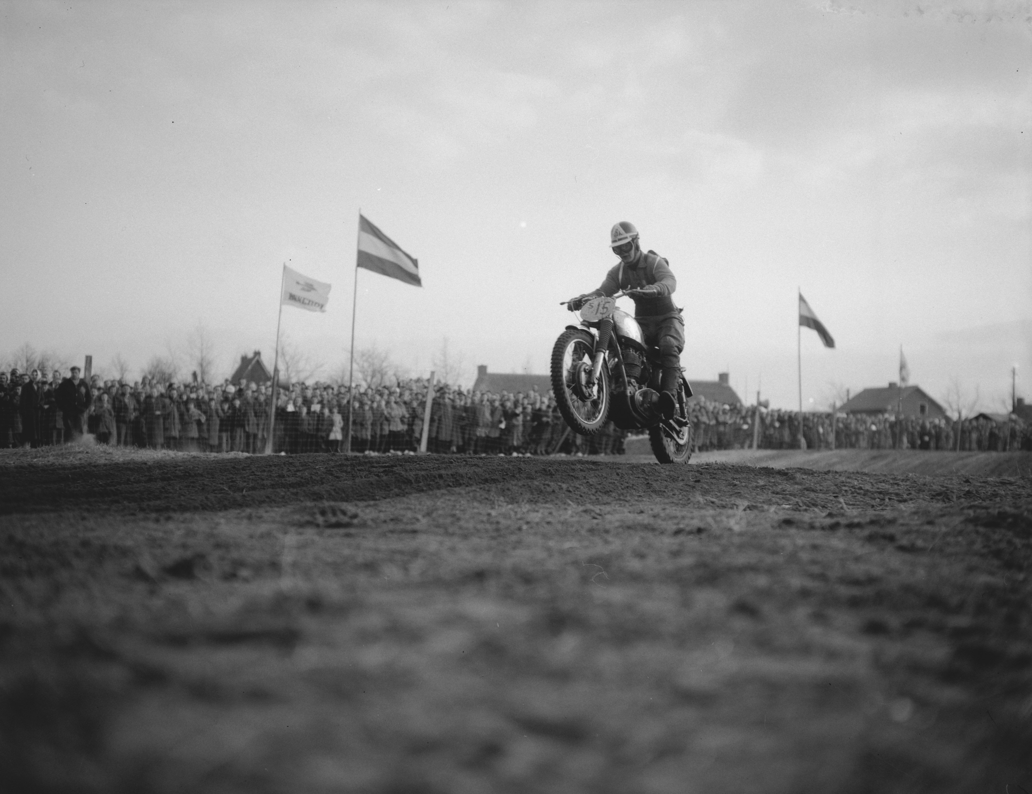 Collectie / Archief : Fotocollectie Anefo Reportage / Serie : [ onbekend ] Beschrijving : Bill Milsson (Zweden op Cresent) Datum : 16 maart 1958 Locatie : Zweden Trefwoorden : motorcrossen Persoonsnaam : Bill Milsson Fotograaf : Rossem, Wim van / Anefo Auteursrechthebbende : Nationaal Archief Materiaalsoort : Negatief (zwart/wit) Nummer archiefinventaris : bekijk toegang 2.24.01.04 Bestanddeelnummer : 909-4091